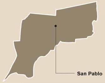 Mapa de los distritos del cantón de San Pablo, provincia de Heredia, Costa Rica.